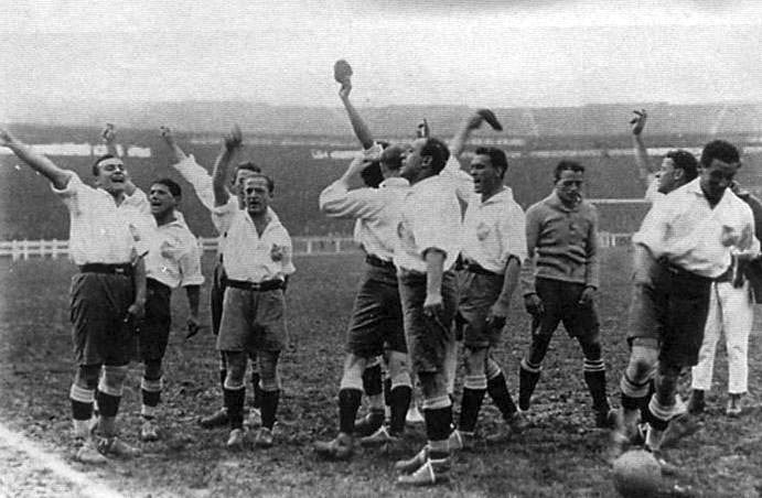 Plantel del Club Nacional de Football en París, en el marco de la Gira Europea de 1925.